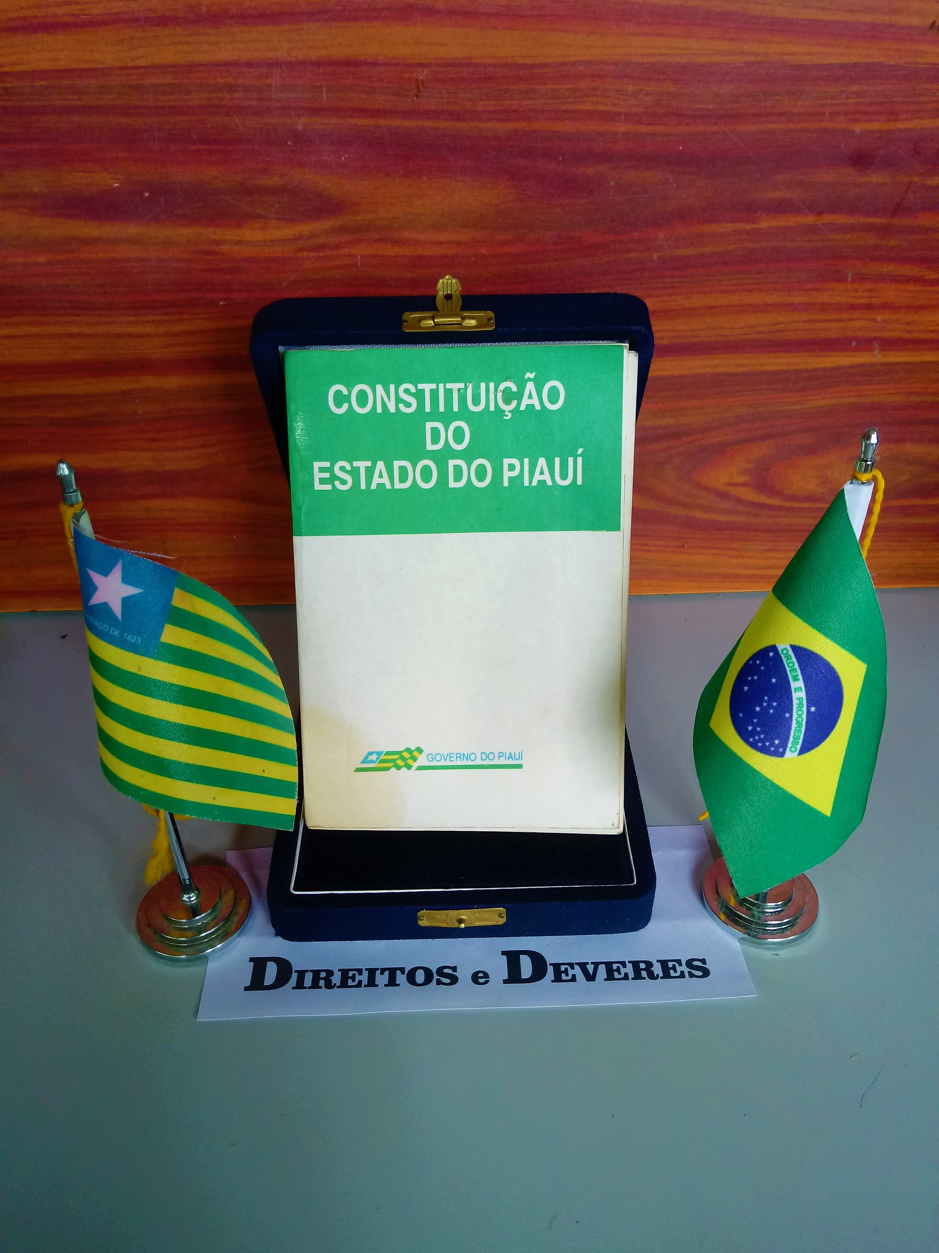 Raro exemplar de bolso da Constituição do Estado do Piauí de 1989 feito pelo goverdo do Piauí em 1990.